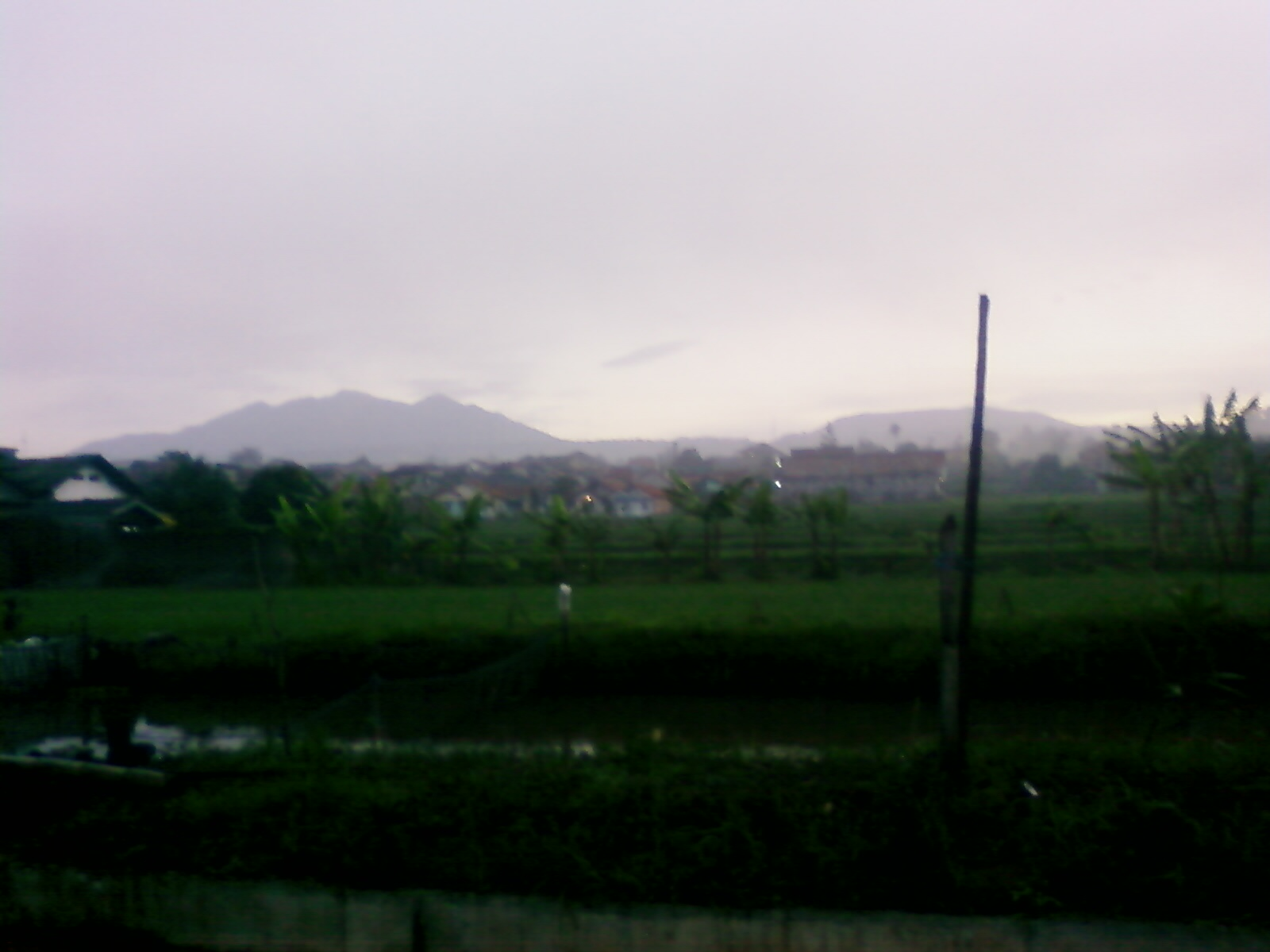 Sunda: gunung tangkuban parahu sareng gunung burangrang